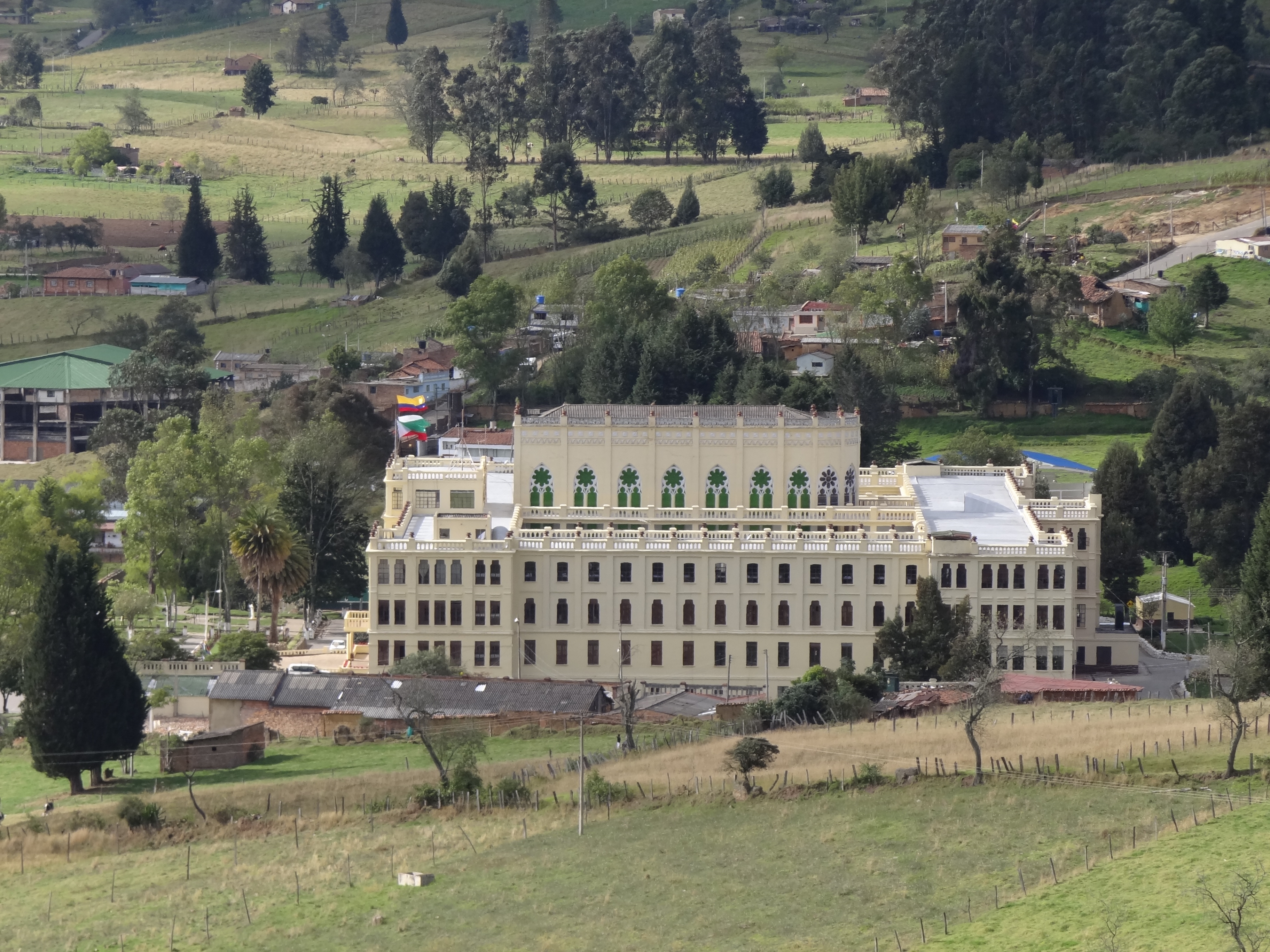 Escuela de policía Rafael Reyes, municipio de Santa Rosa de Viterbo, departamento de Boyacá, Colombia